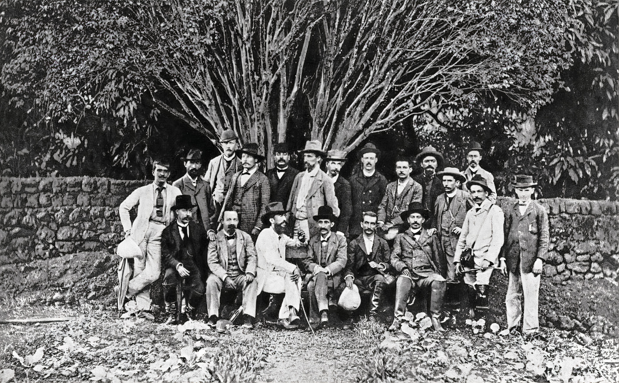 Membros da Comissão Cruls de delimitação do local de Brasília